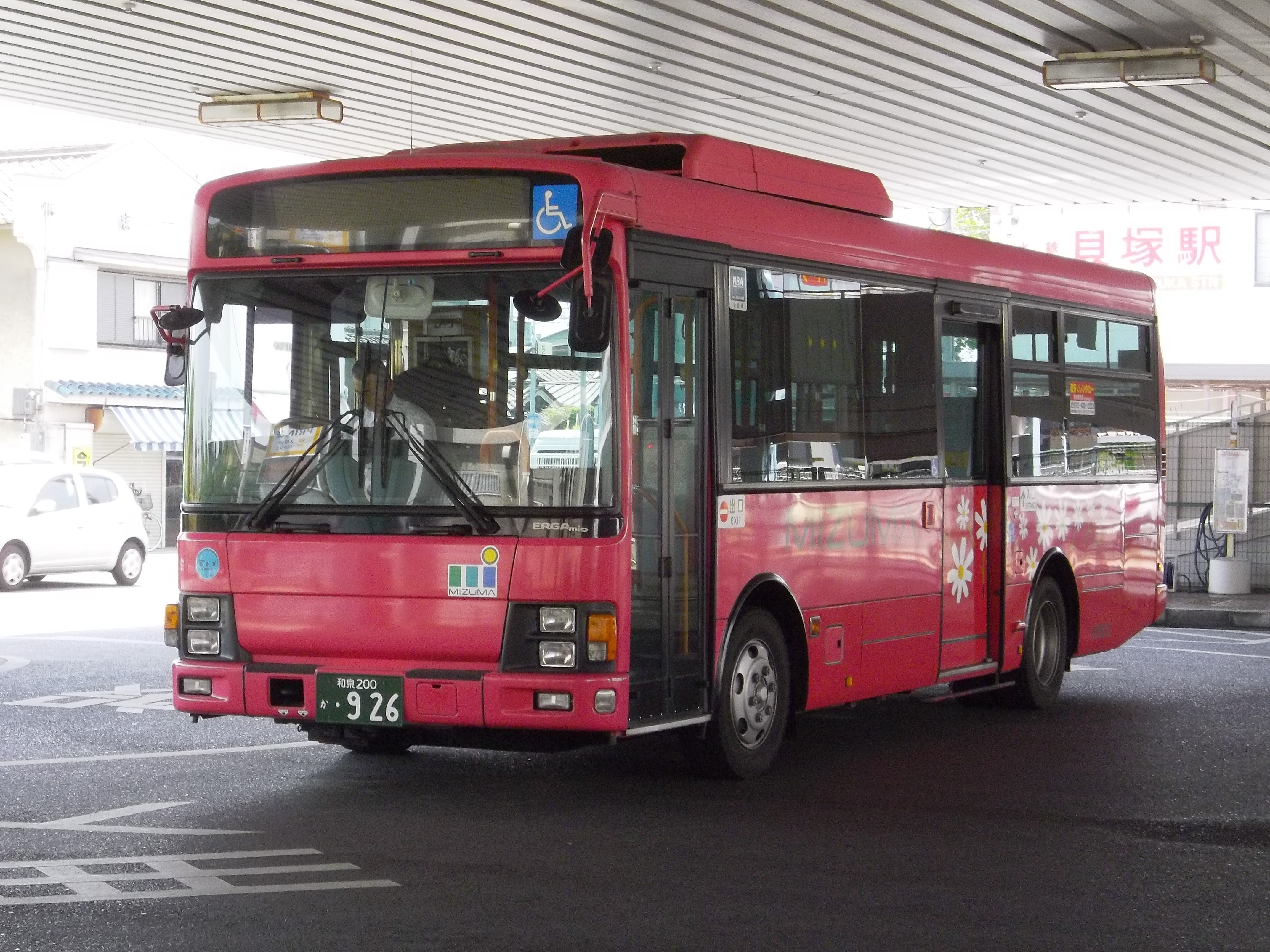 水間鉄道路線バスで使用されるいすゞエルガミオワンステップ。南海貝塚駅から二色地区を結ぶ路線を主体に使用される。